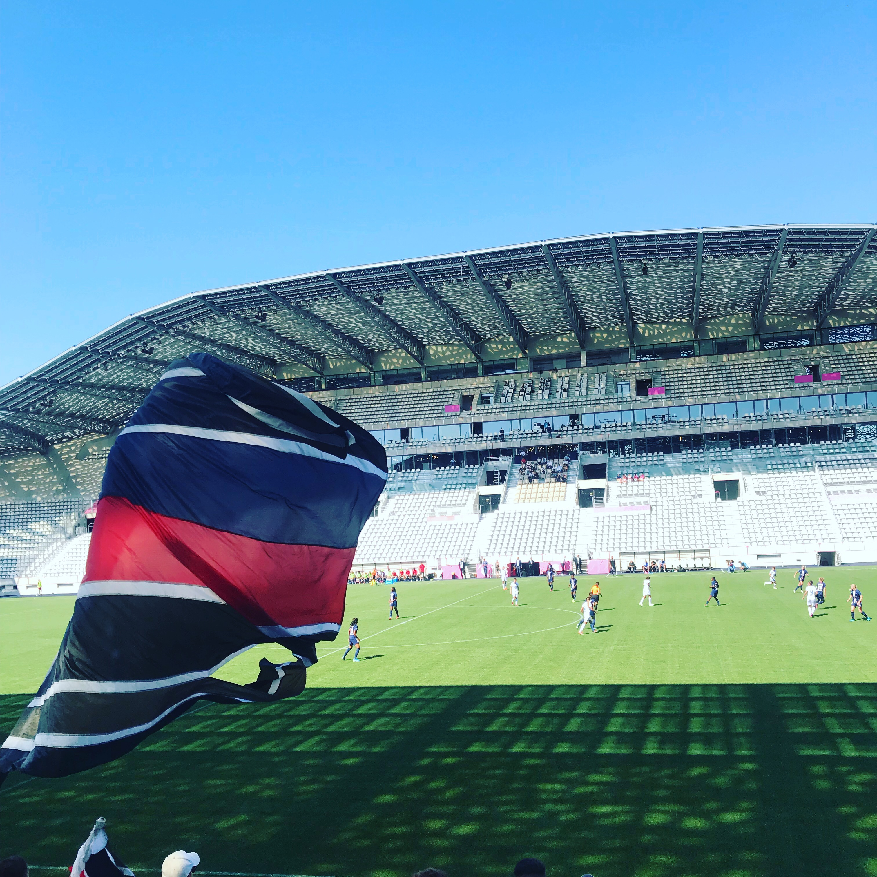 PSG-Soyaux Féminines Stade Jean Bouin